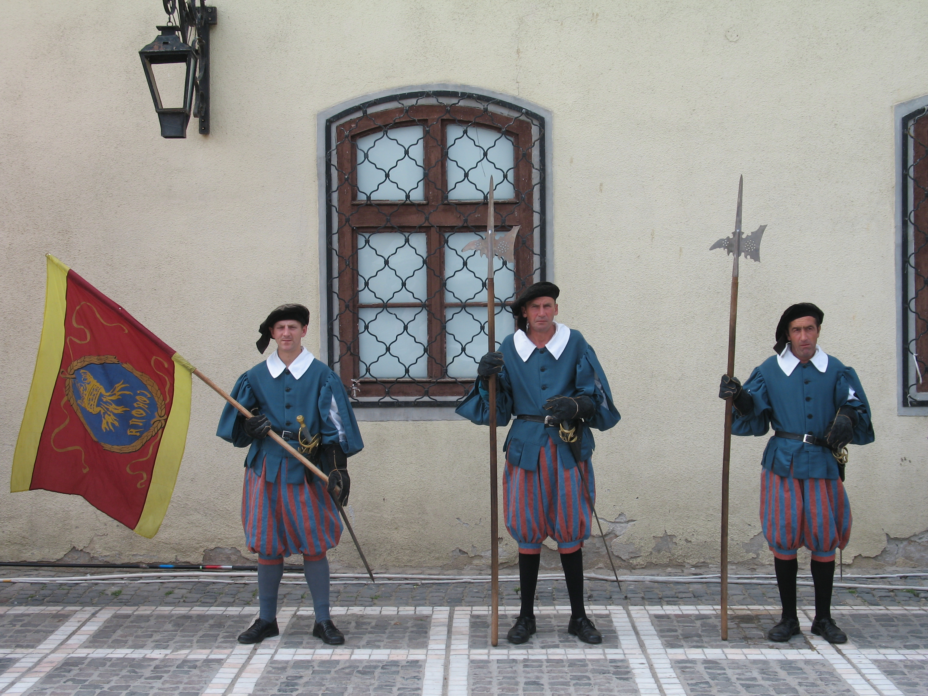 Cambio de guardia en la plaza Sfatului junto al Ayuntamiento de Brasov.